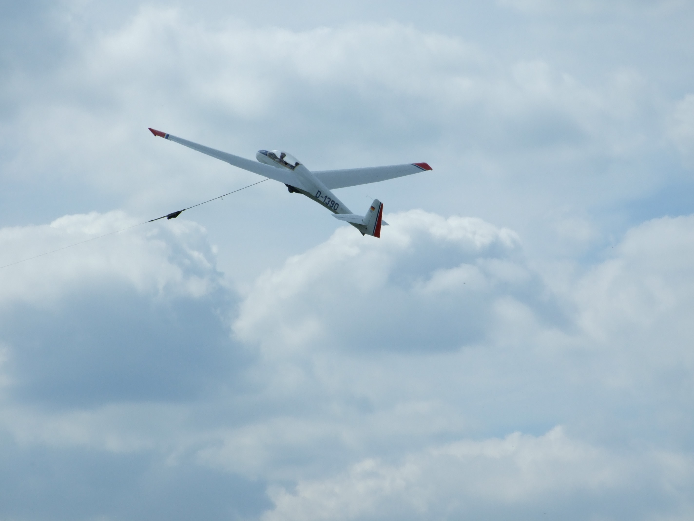 Segelflugzeug beim Windenstart vom Flugplatz Anspach